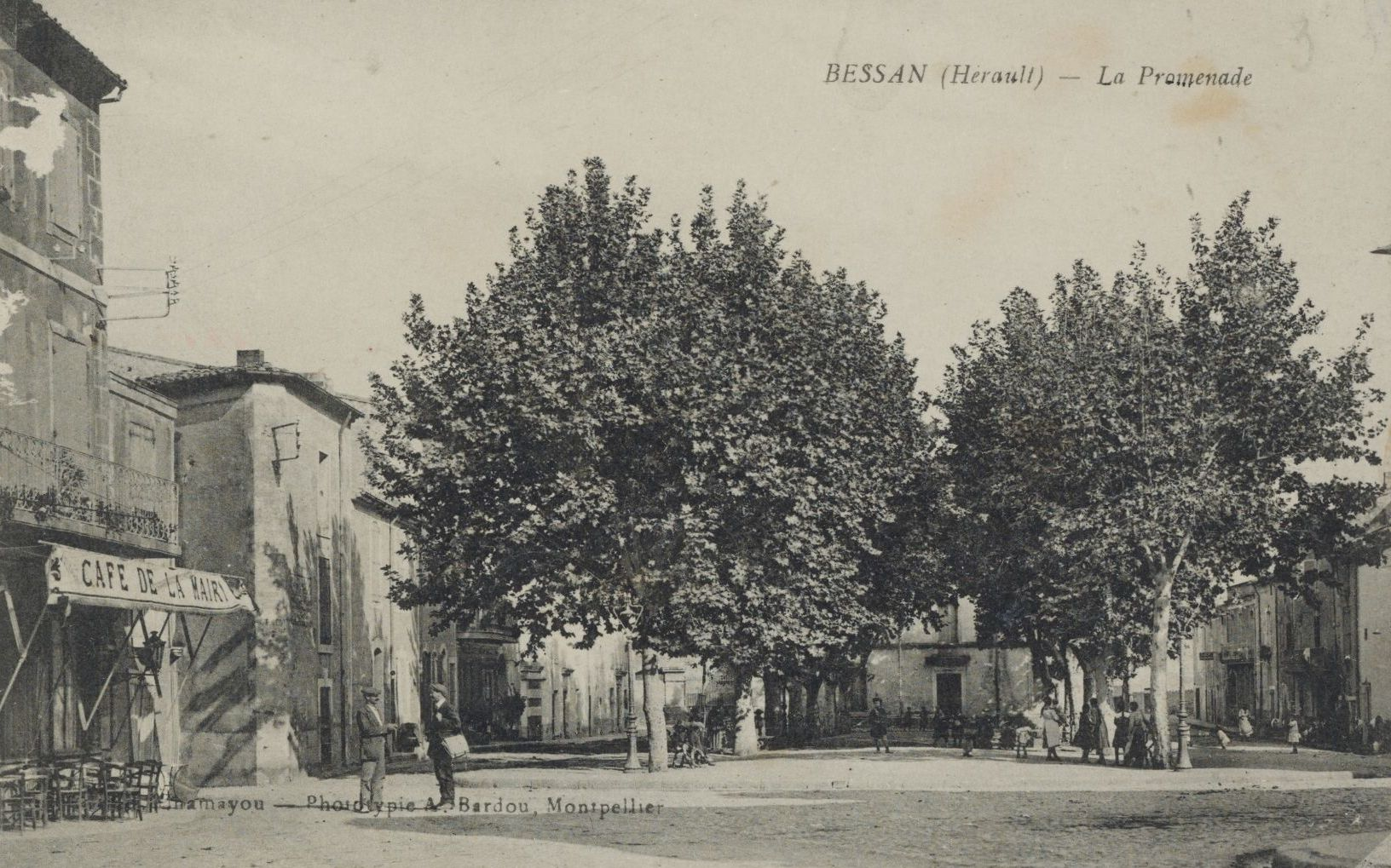 Bessan. - La Promenade : carte postale, 1ère moitié du XXe siècle